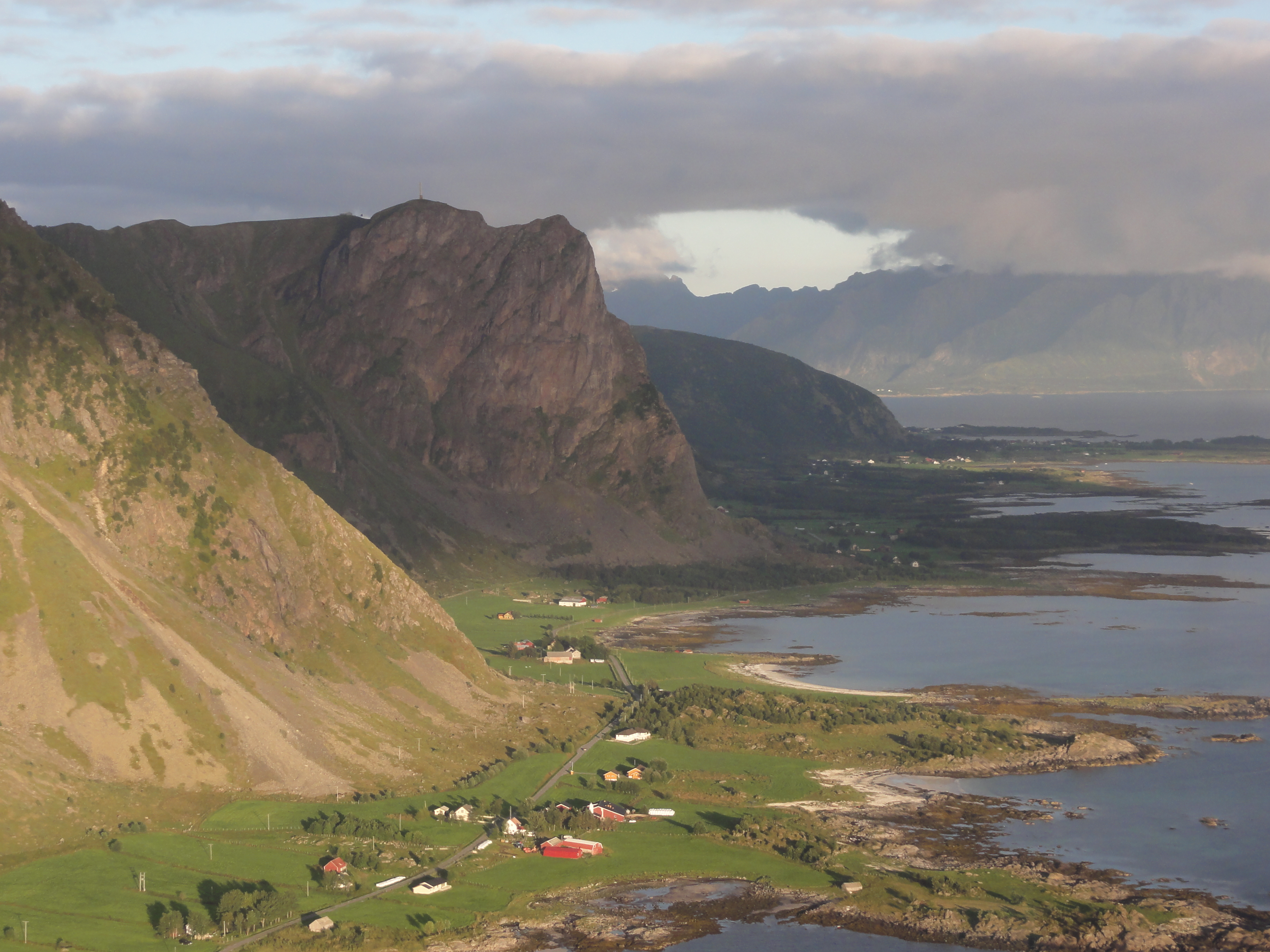 Hadseløya med Utbjørg og Hokland i Hadsel kommune, Vesterålen, Nordland. Nyken midt i bildet.